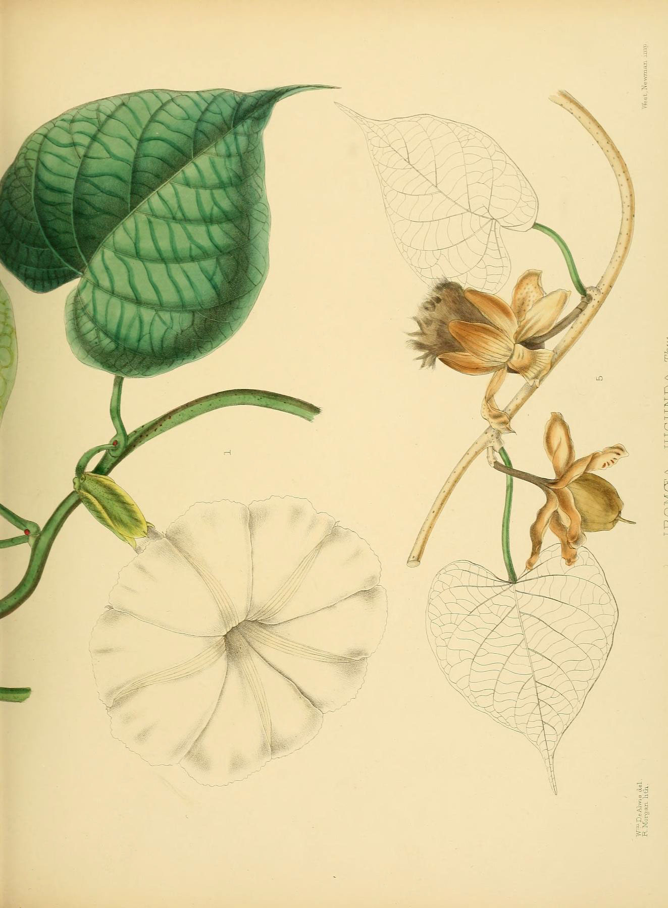 I